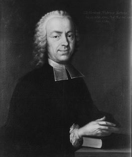 Gemälde in der Professorengalerie Tübingen